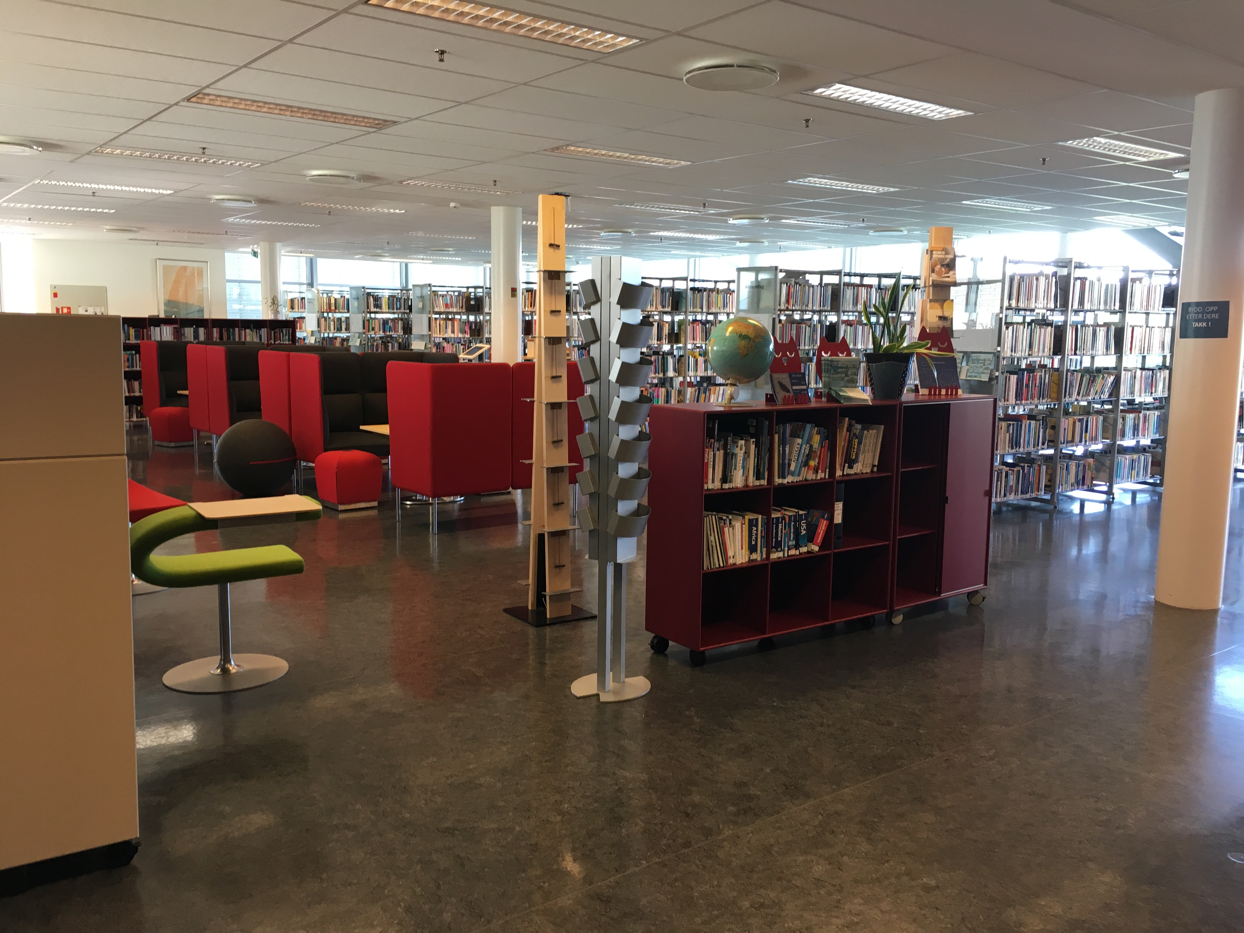 NTNU Biblioteket Ålesund